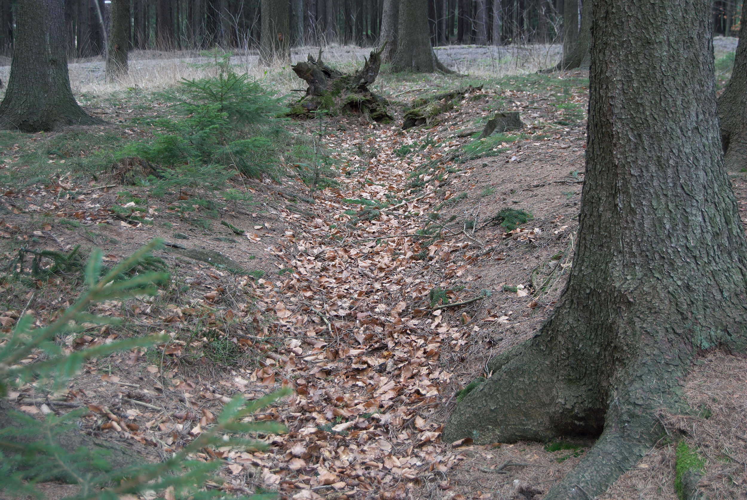 Hraniční příkop na zemské hranici Čech a Moravy jižně od silnice z Hamrů nad Sázavou do Sázavy. Vlevo (z pohledu fotoaparátu) jsou Čechy (a zároveň k. ú. Zásava), vpravo je Morava (a zároveň k. ú. Hamry nad Sázavou).